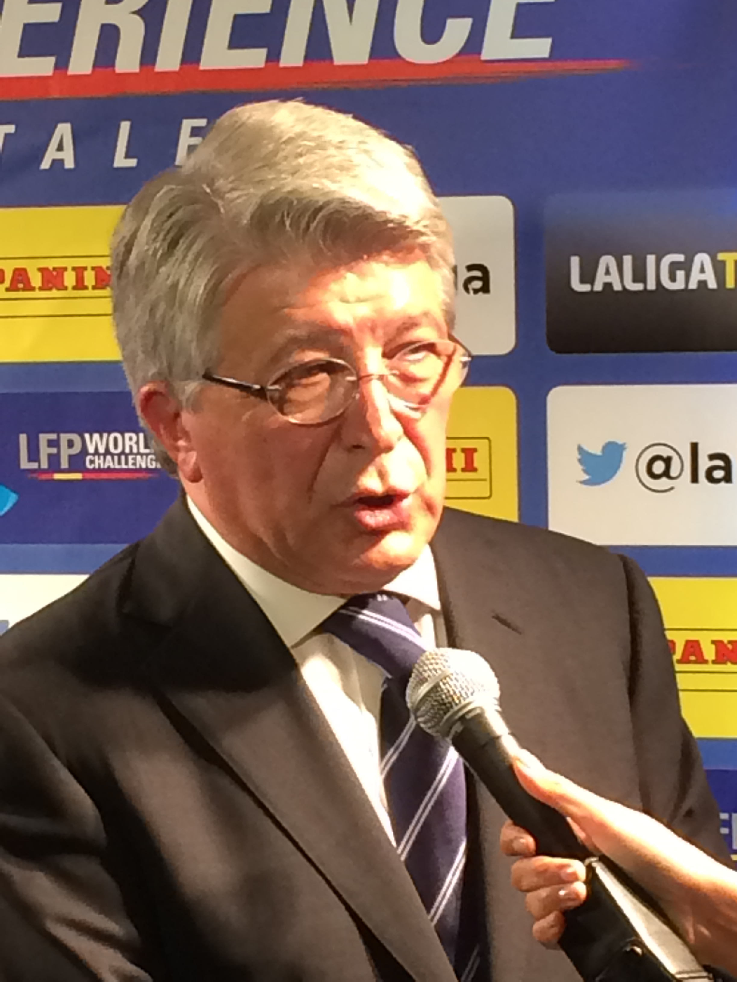 Enrique Cerezo, presidente del Atlético de Madrid, en San Francisco (California) horas antes del partido entre su equipo y el San José Earthquakes. 27 de julio de 2014